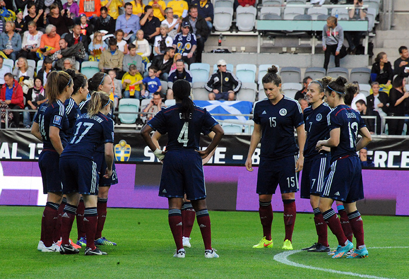 a_10_1619